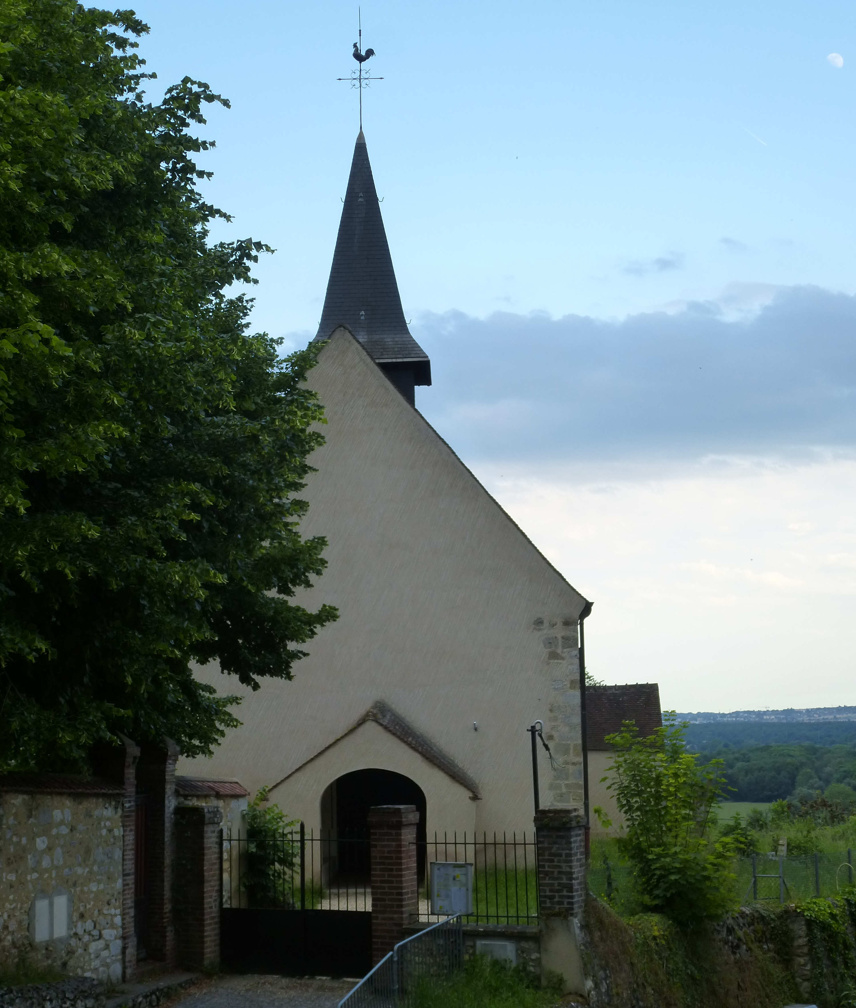 Église Saint-Michel de Rolleboise. (département des Yvelines, région Île-de-France).